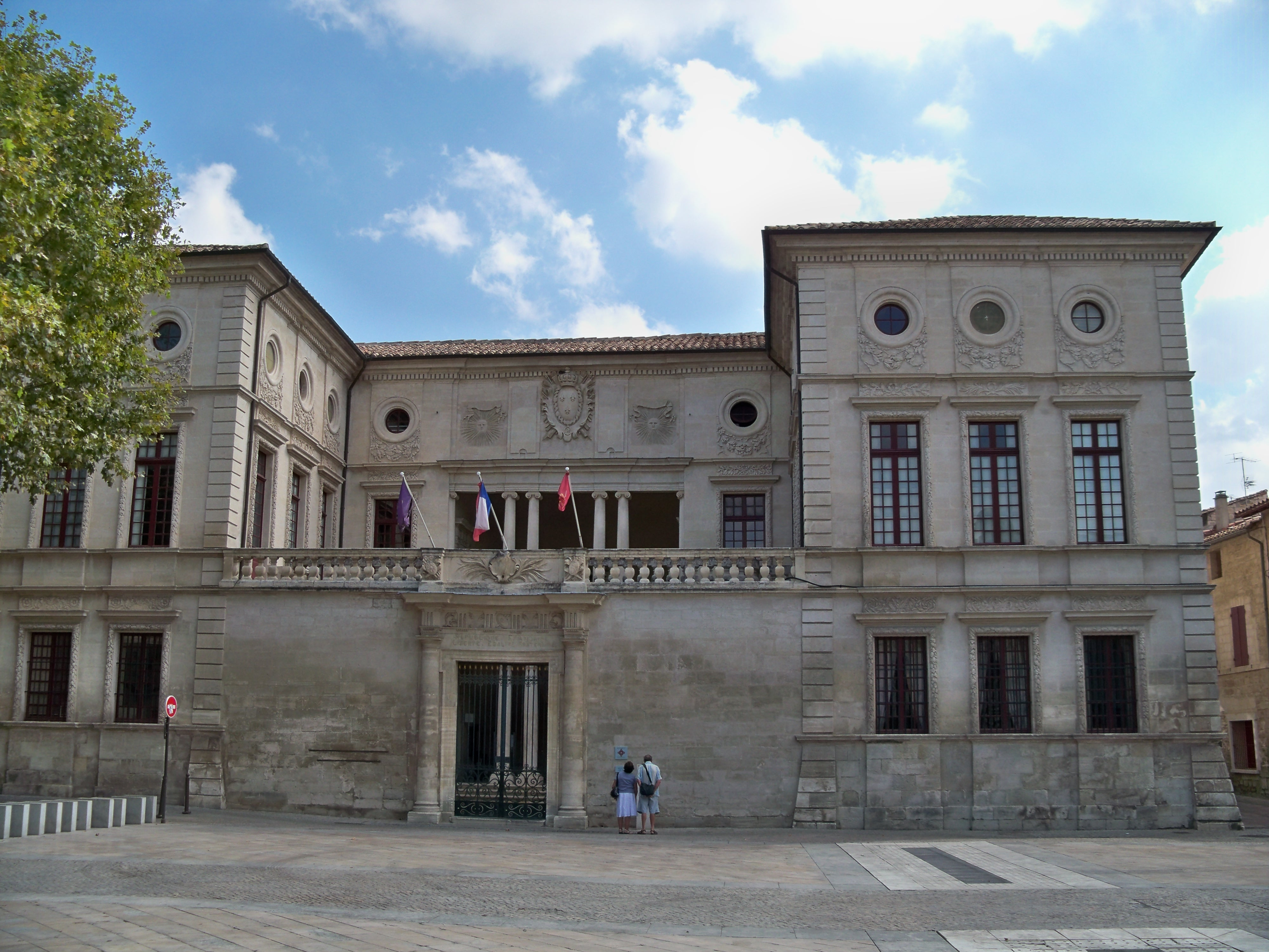 Hotel de ville de Beaucaire (30) .